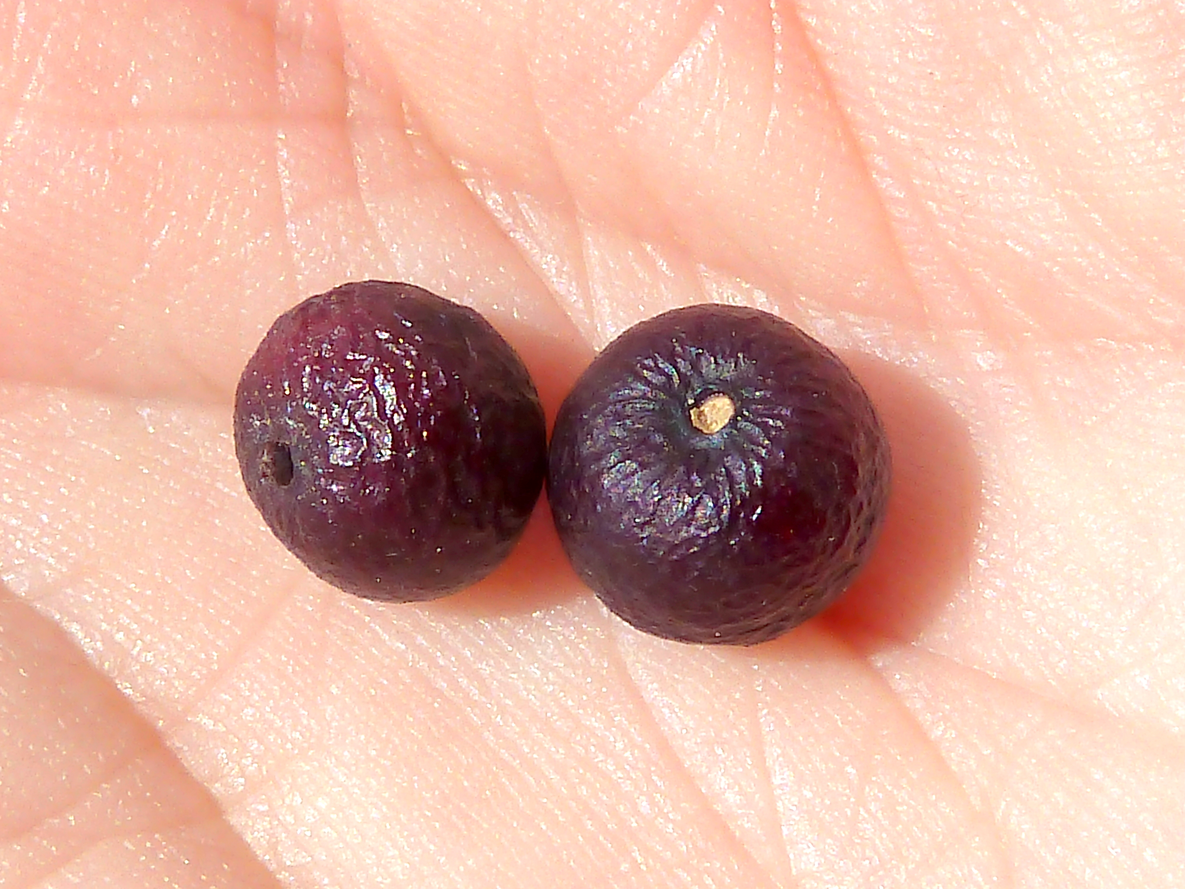 Nandina domestica ( Bambú sagrado) - Frutos maduros sueltos. -Cultivado/ornamental, Paseo de El Salvador, Parque del Buen Retiro, Madrid (España).